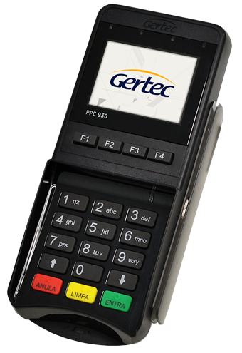 Equipamento: PinPad930. Segurança:Teclado criptografado e certificado por PCI, EMV, Anatel, Abecs, TQM, PayPass, PayWave e ExpressPay. Tecnologia: Cartão de SmartCard(chip), Tarja Magnética e ContactLess(Samsung Pay/ApplePay) etc.